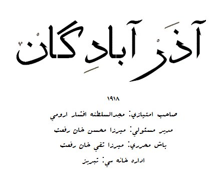 تۆرکجه: آزربایجان تورکجه‌سینده تقی رفعتین یایدیغی درگی